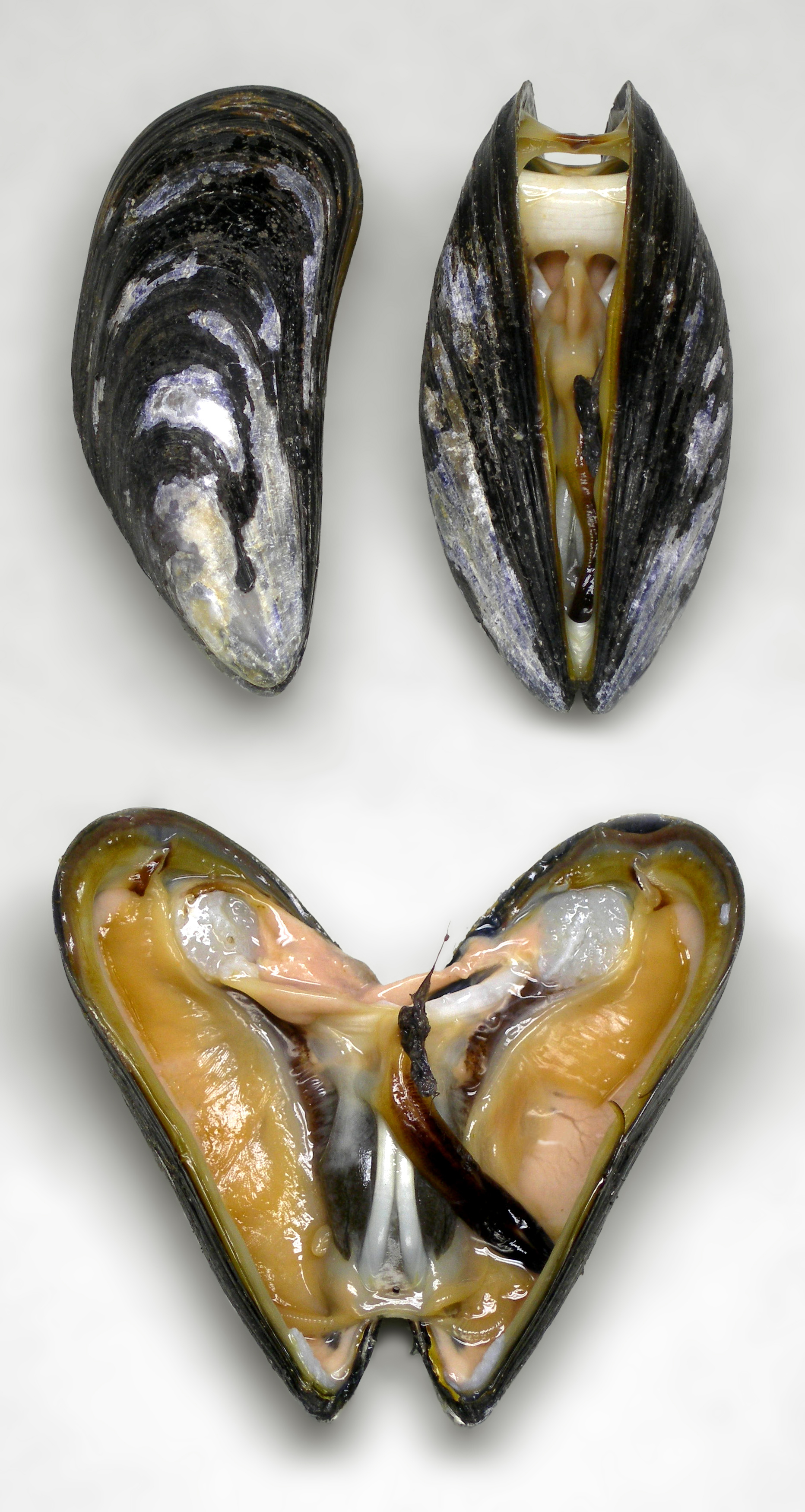 Miesmuscheln: Seitlich, von der Unterseite aus und aufgeklappt mit durchtrenntem Schließmuskel